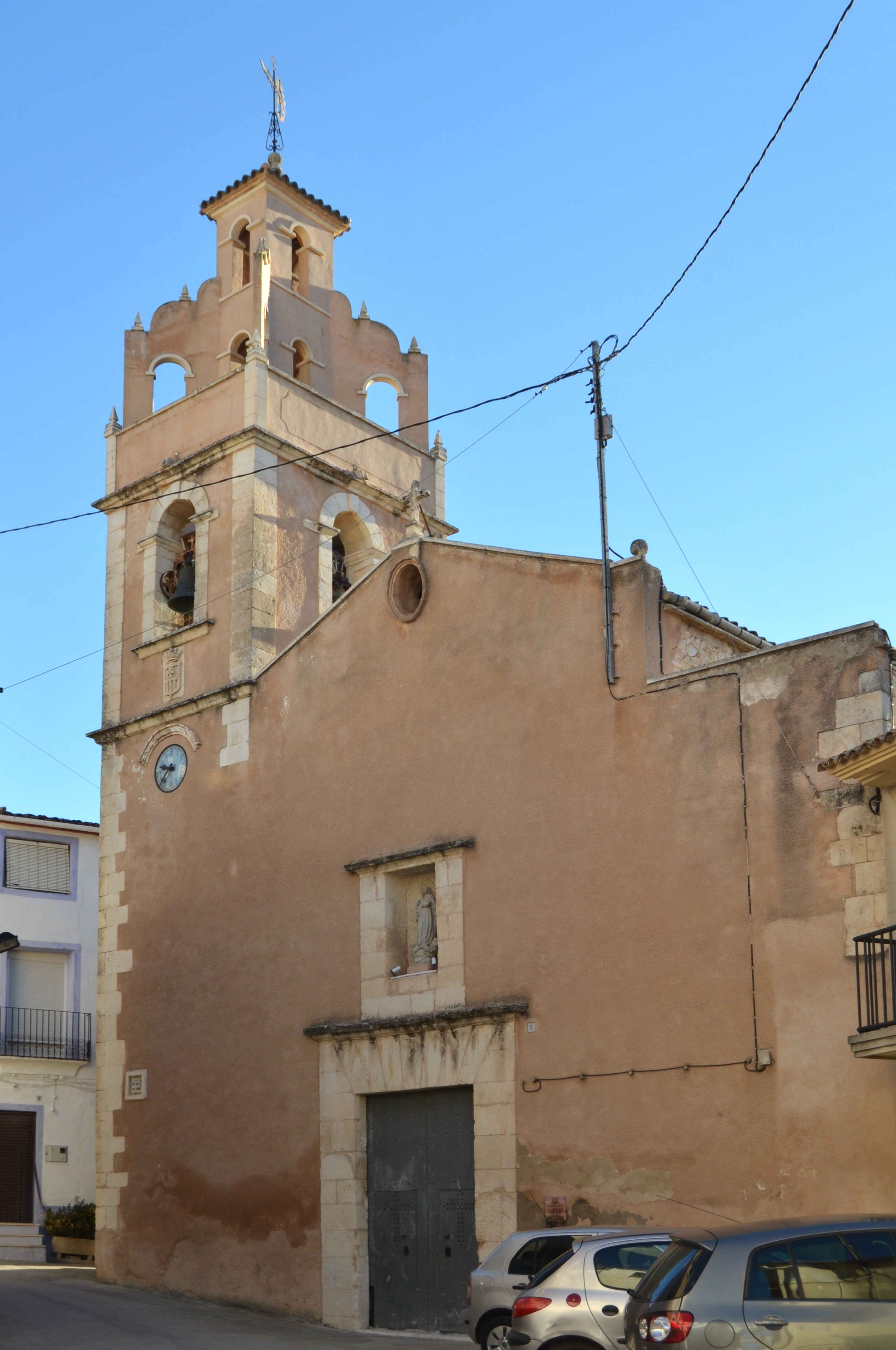 Església de la Puríssima Concepció de Benimassot.